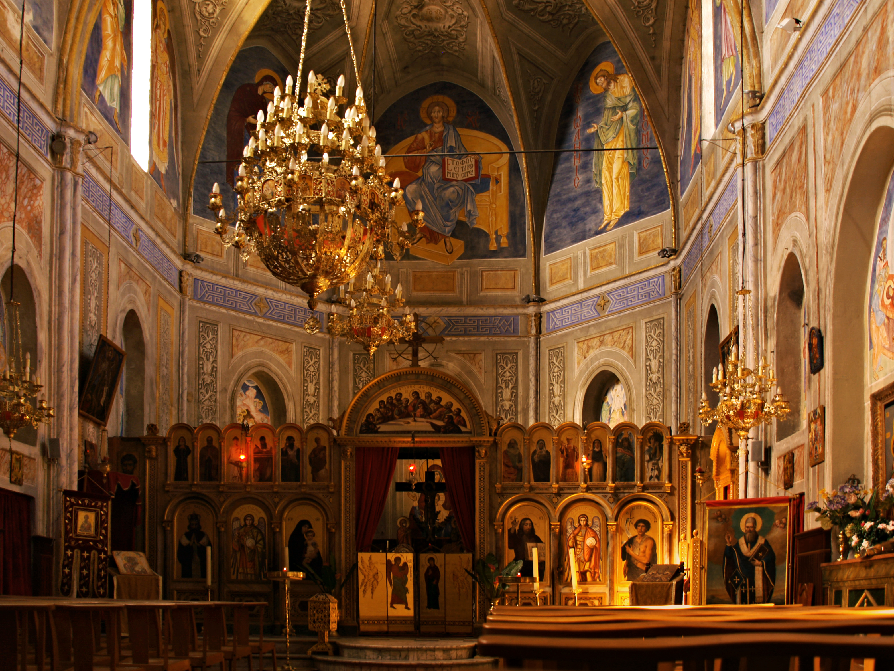 Cargèse (Corse) - Sanctuaire et iconostase de l'église Saint-Spiridon dite grecque